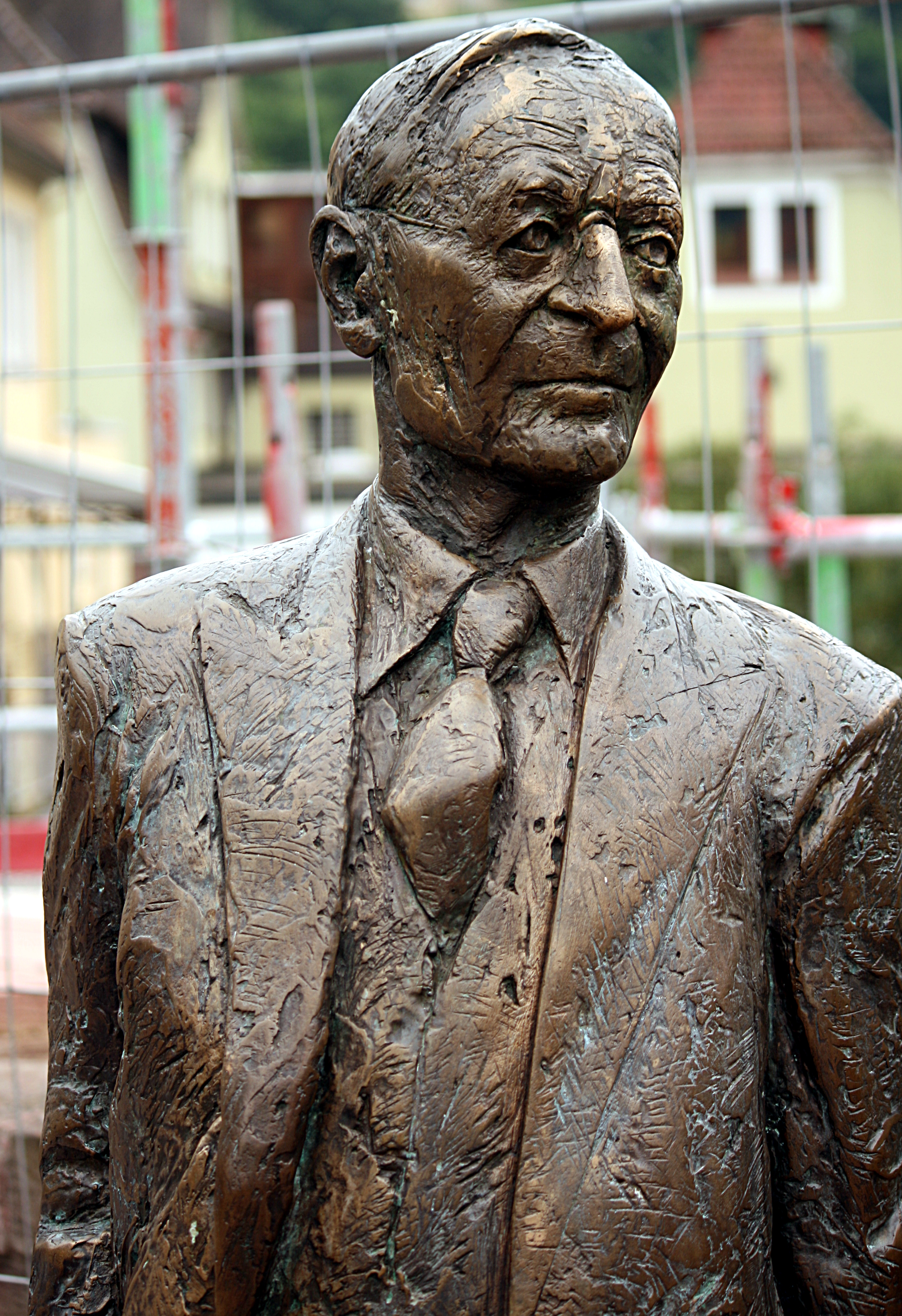 Calw_Nikolausbrücke,_Hermann_Hesse_Plastik